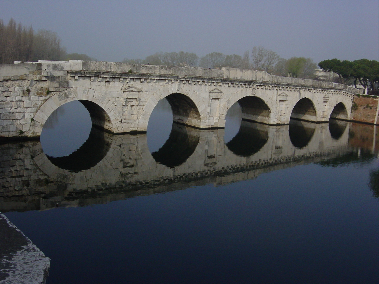 Il ponte di Tiberio di Rimini (I secolo d.C.). Foto di Giovanni Dall'Orto, aprile 2004. Tiberius bridge in Rimini (first century aD). Picture by Giovanni Dall'Orto, april 2004.